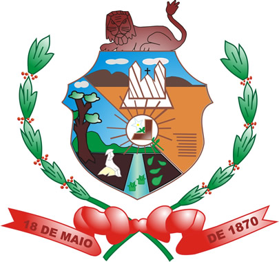 Brasão do Município